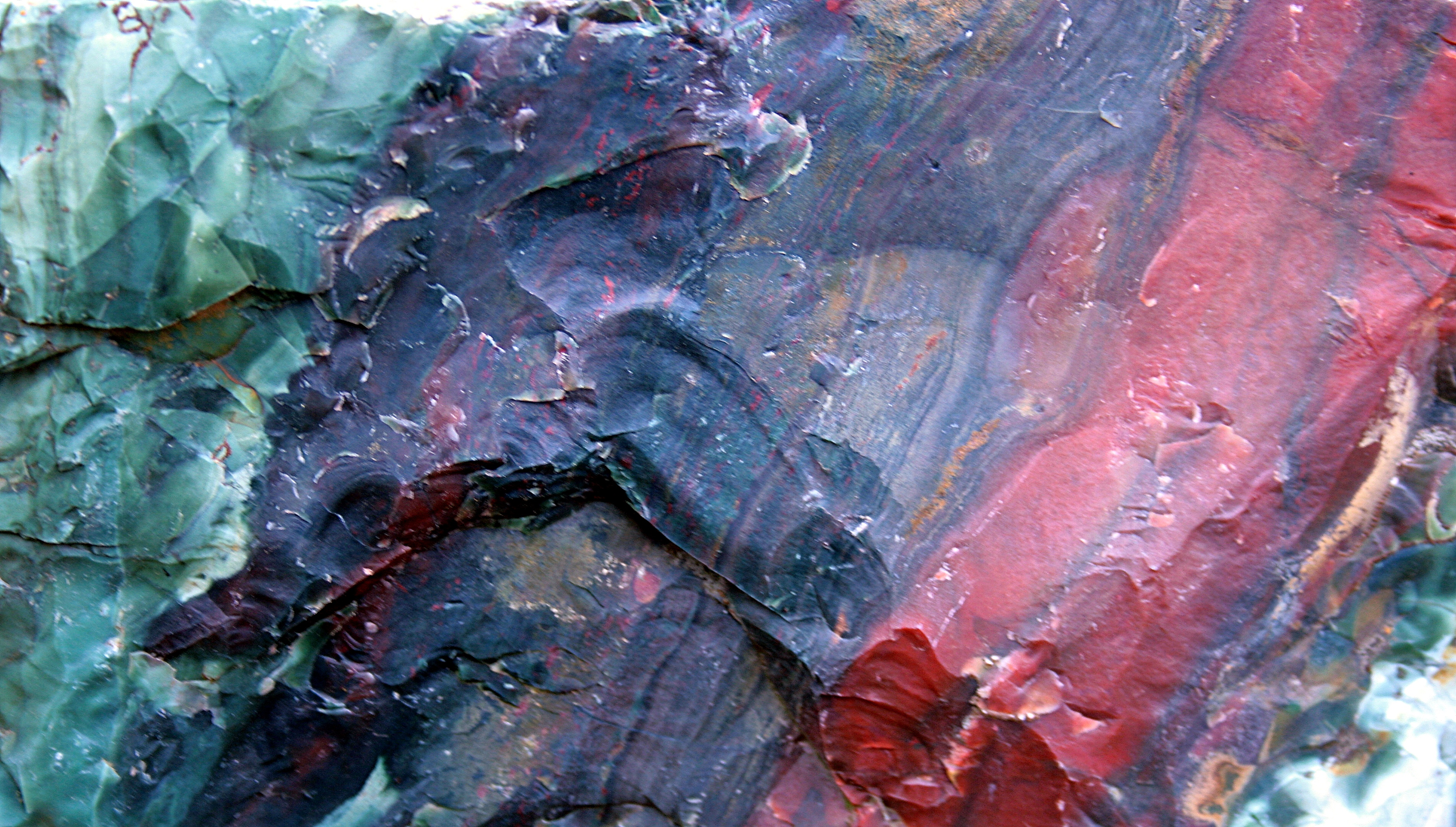 Stöðvarfjörður: gebänderter Achat. Steinemuseum Petra Sveinsdóttir